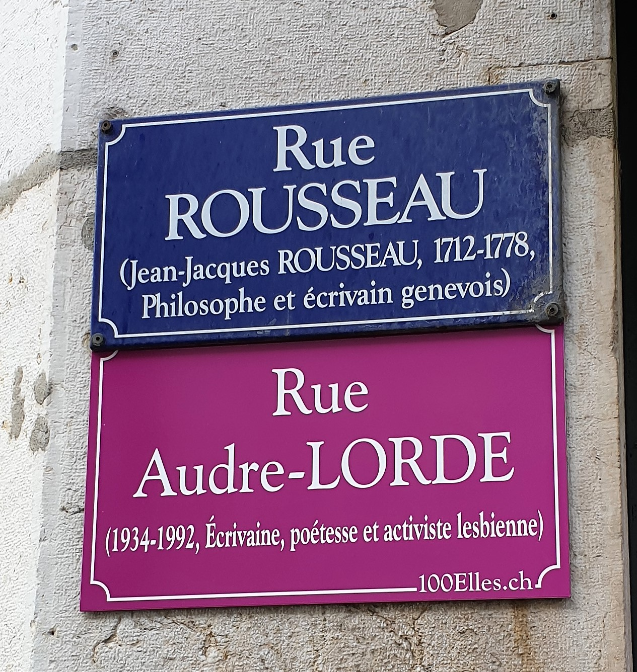 Plaque temporaire de rue apposée dans le cadre du projet 100elles à Genève en 2019